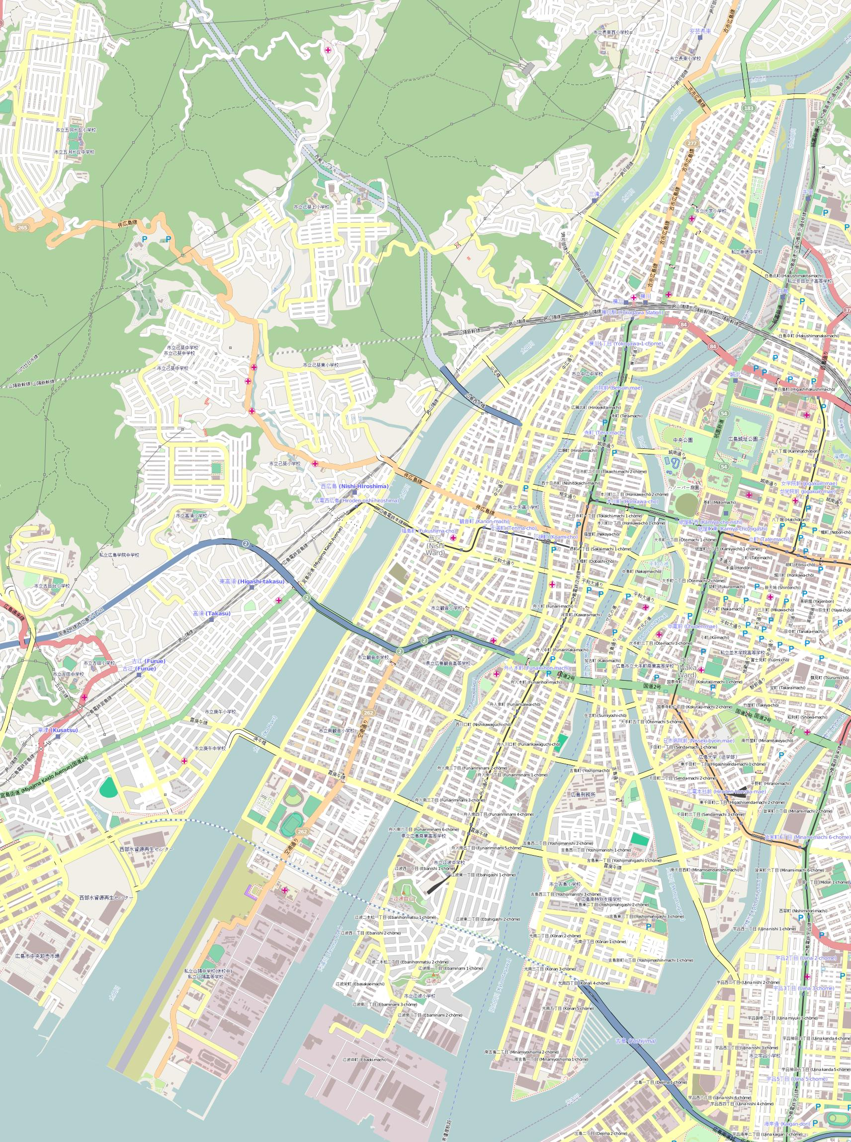 太田川放水路 2013年春時点。 This map may be incomplete, and may contain errors. Don't rely solely on it for navigation.